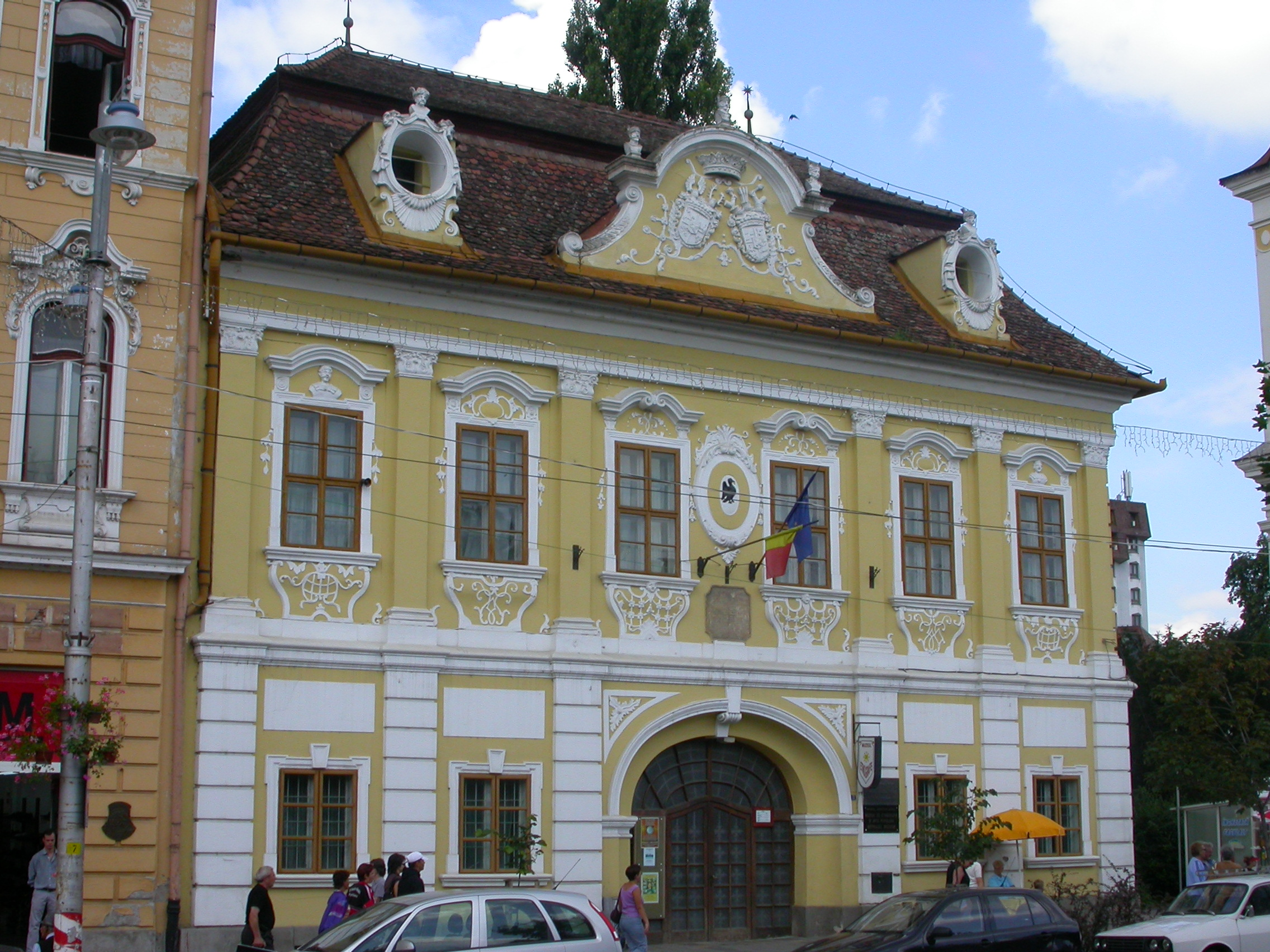 Palatul Toldalagi, 1759 - 1771